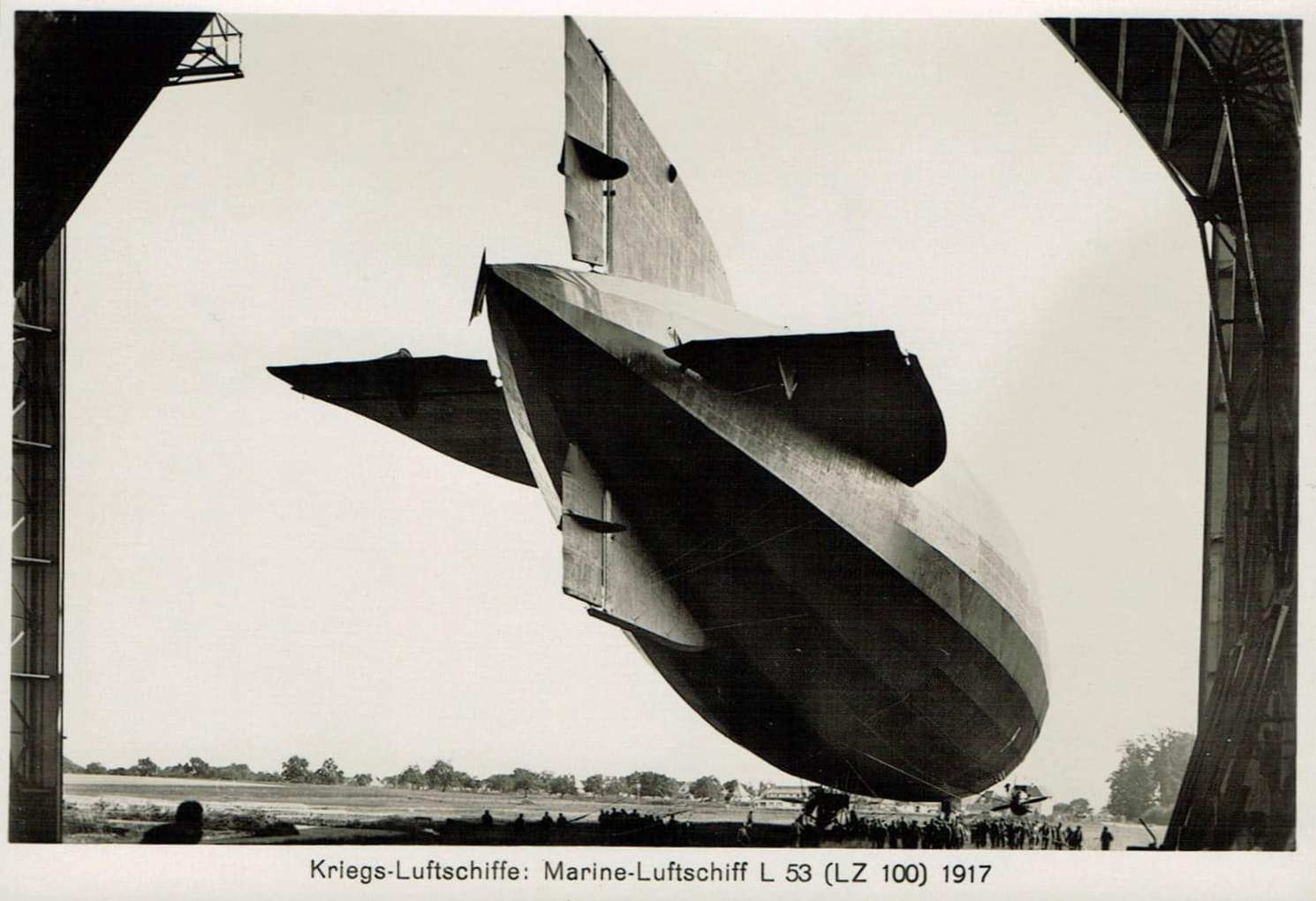 Marineluftskib L 53 (LZ 100)